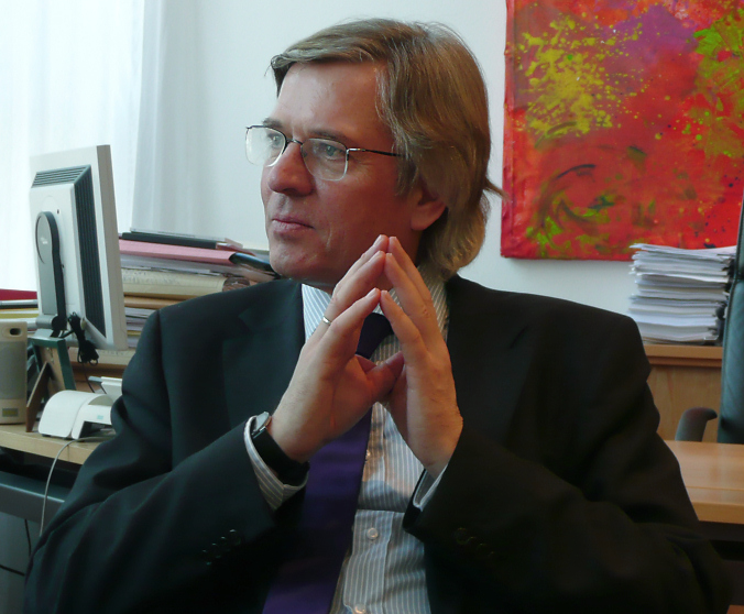 Hartmut Möllring ,deutscher Politiker (CDU), niedersächsischer Finanzminister